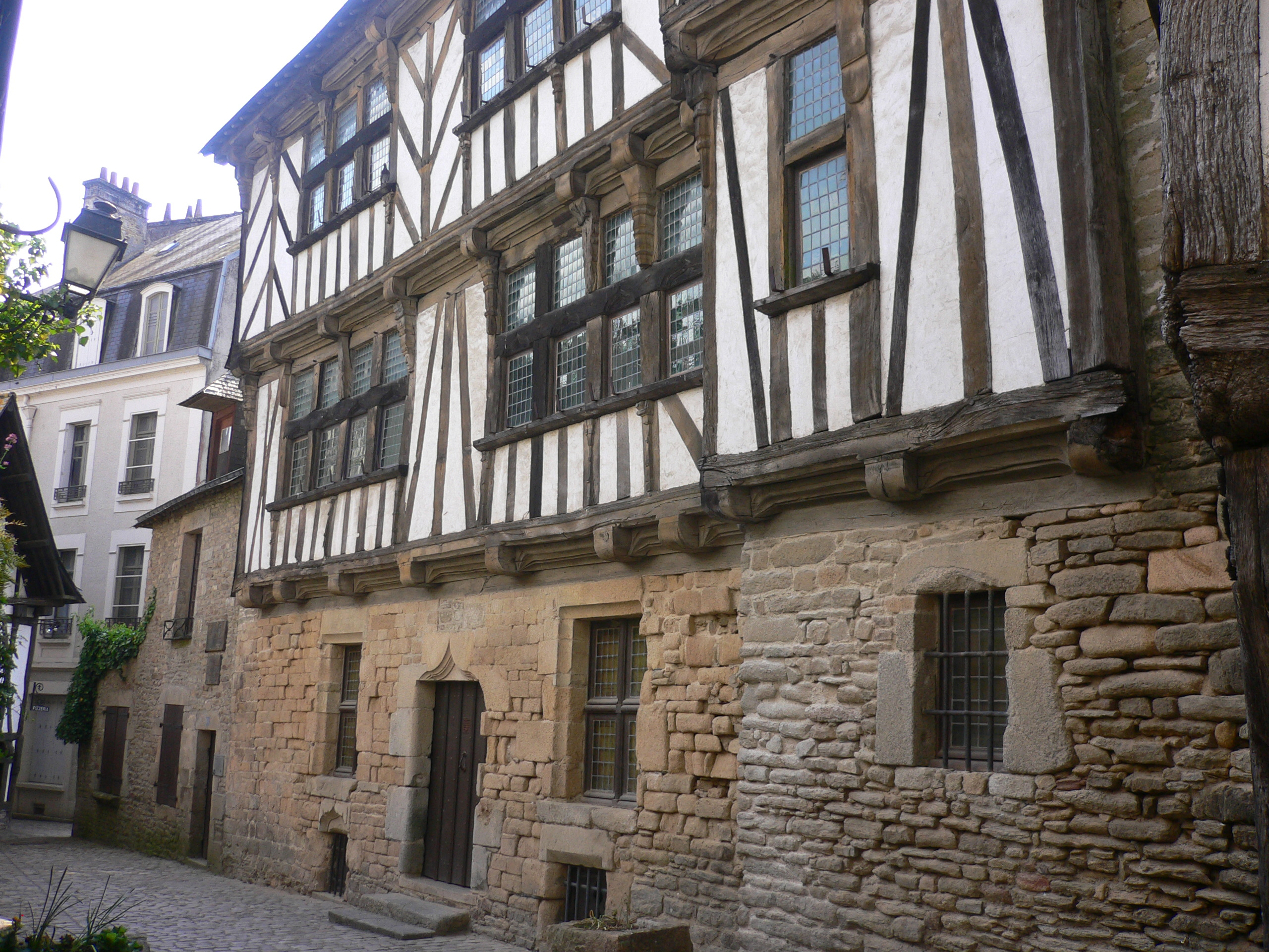 maison des archers à Quimperlé